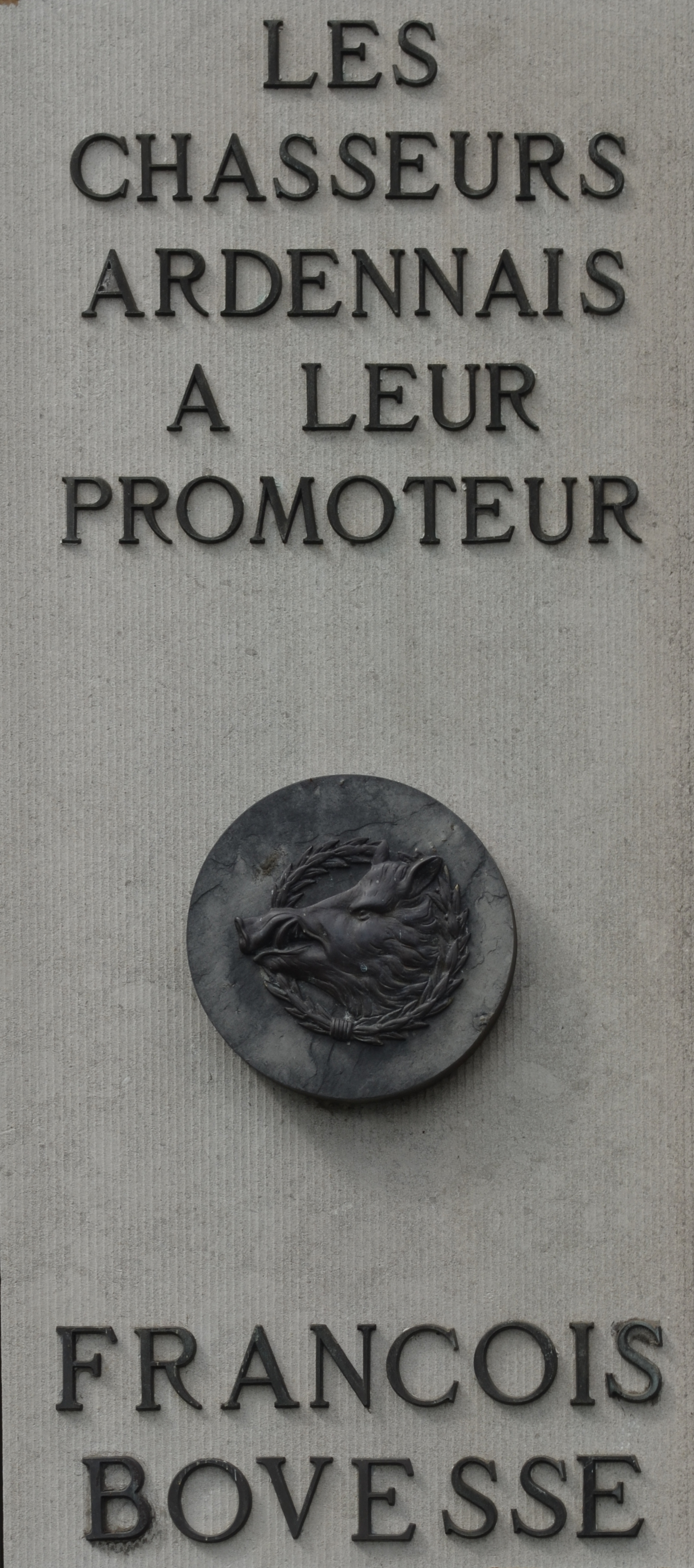 Namur - Monument dédié par les chasseurs ardennais à leur promoteur François Bovesse.